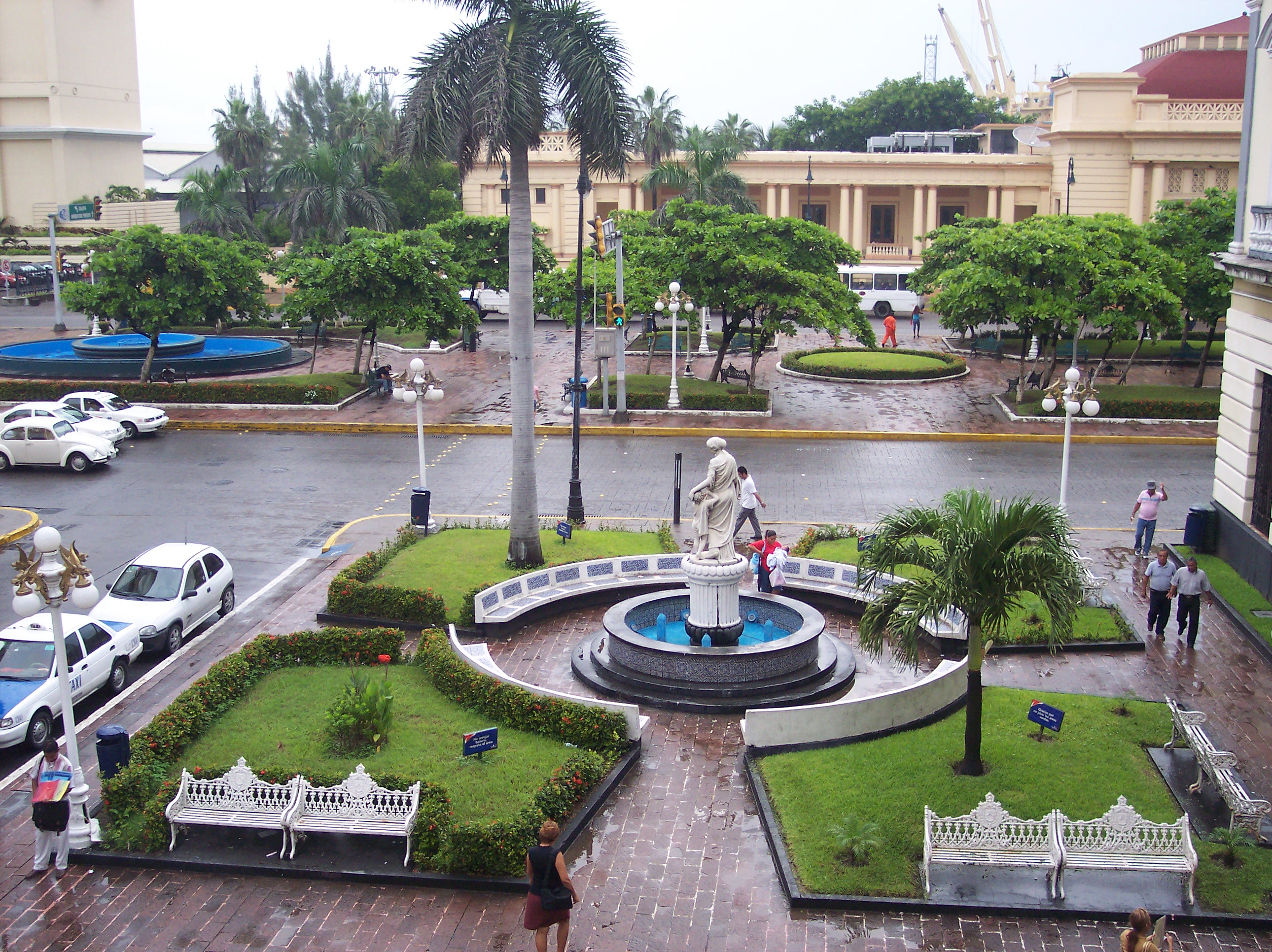 Areas verdes del Registro Civil y Camellón de Av. Morelos. Vista desde la planta alta del Registro Civil. Veracruz, Veracruz.